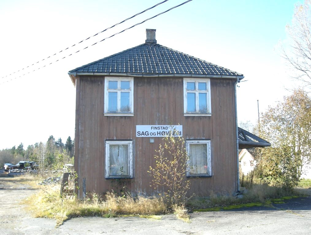 Nedlagte Finstadbru stasjon anno 2009